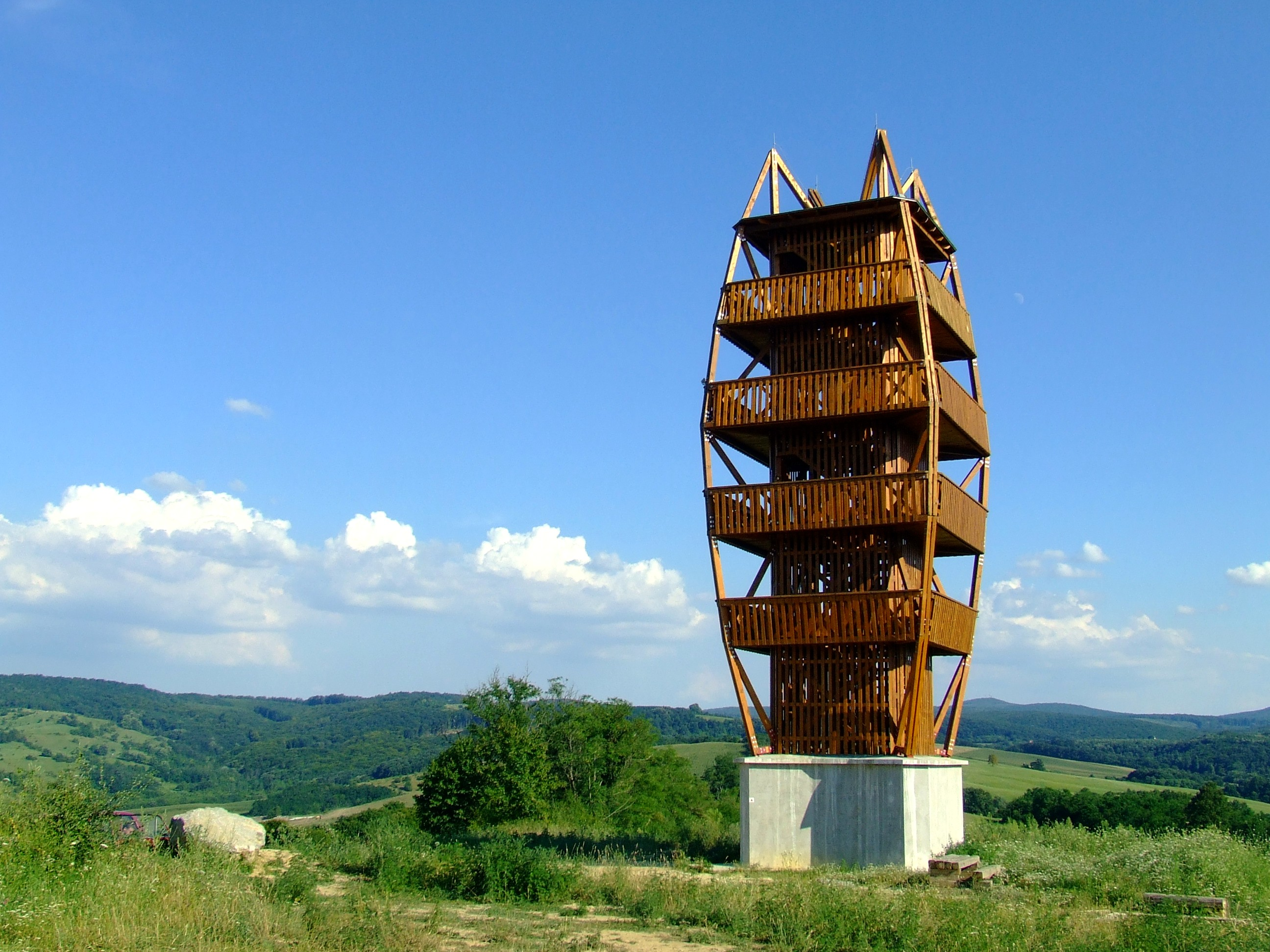 A Napszentély-kilátó a Mecsekben, Magyarhertelend határában